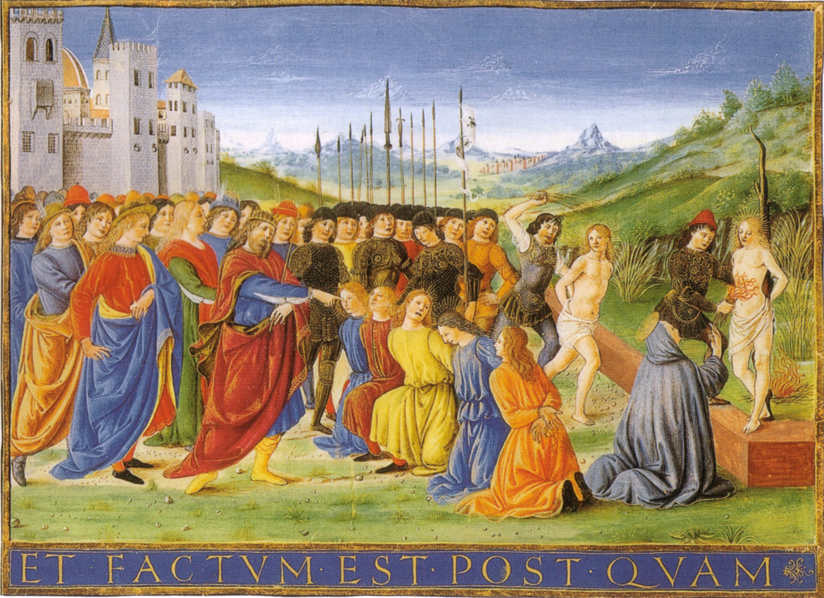 Attavante, martirio dei sette fratelli ebrei, bibl ap vaticana bibbia ms. urb lat 2 f 174v